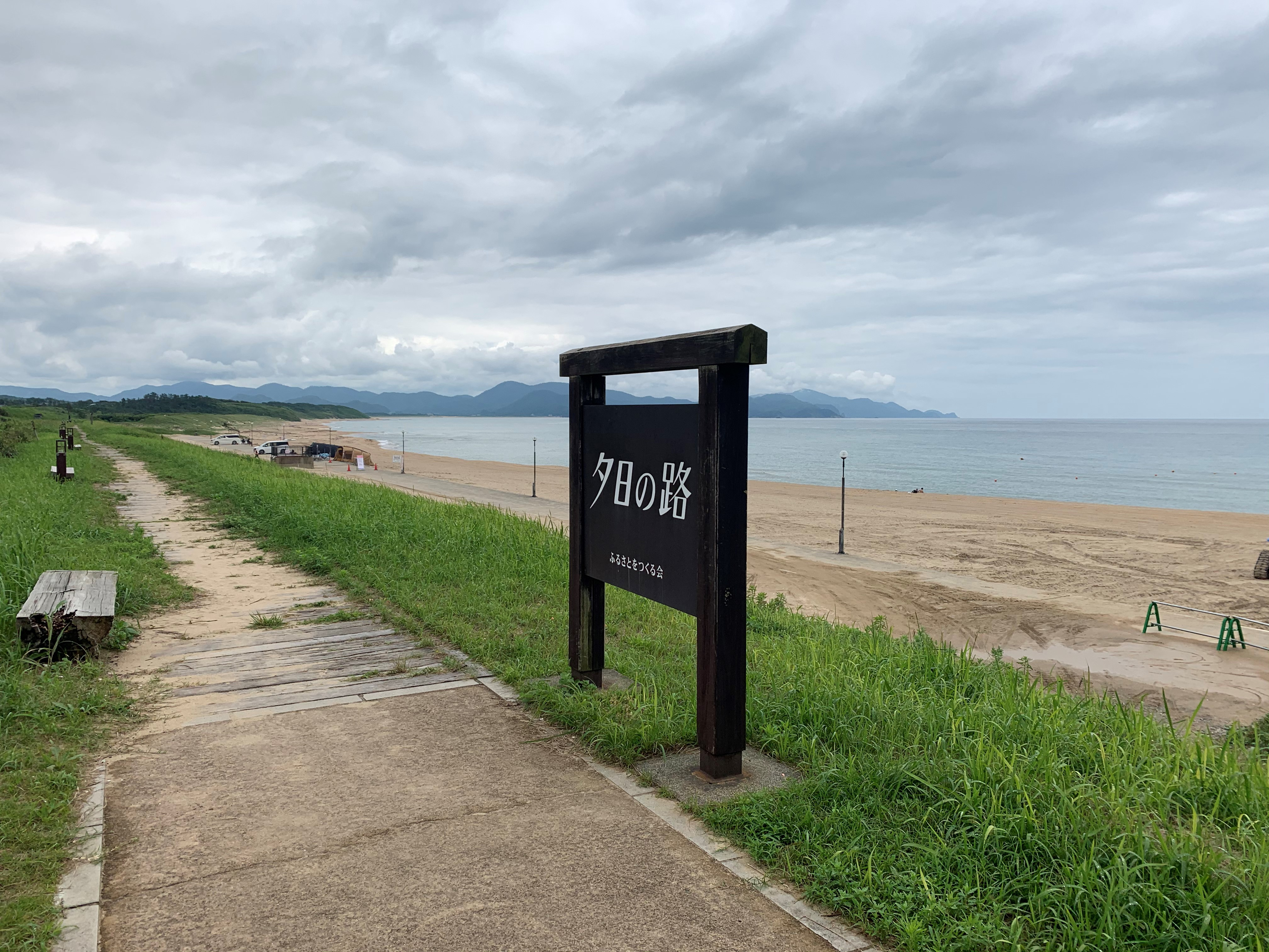 浜詰海岸の夕日の路